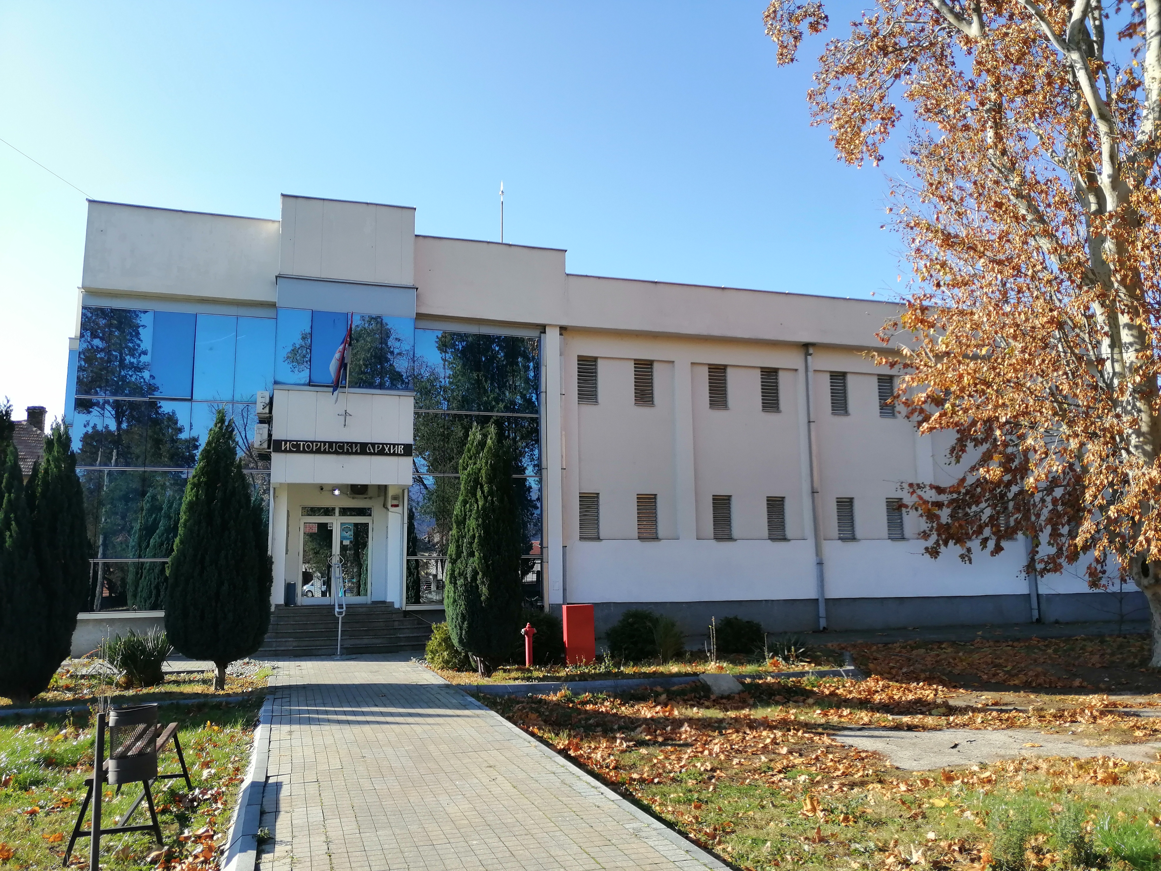 Istorijski arhiv Pirot